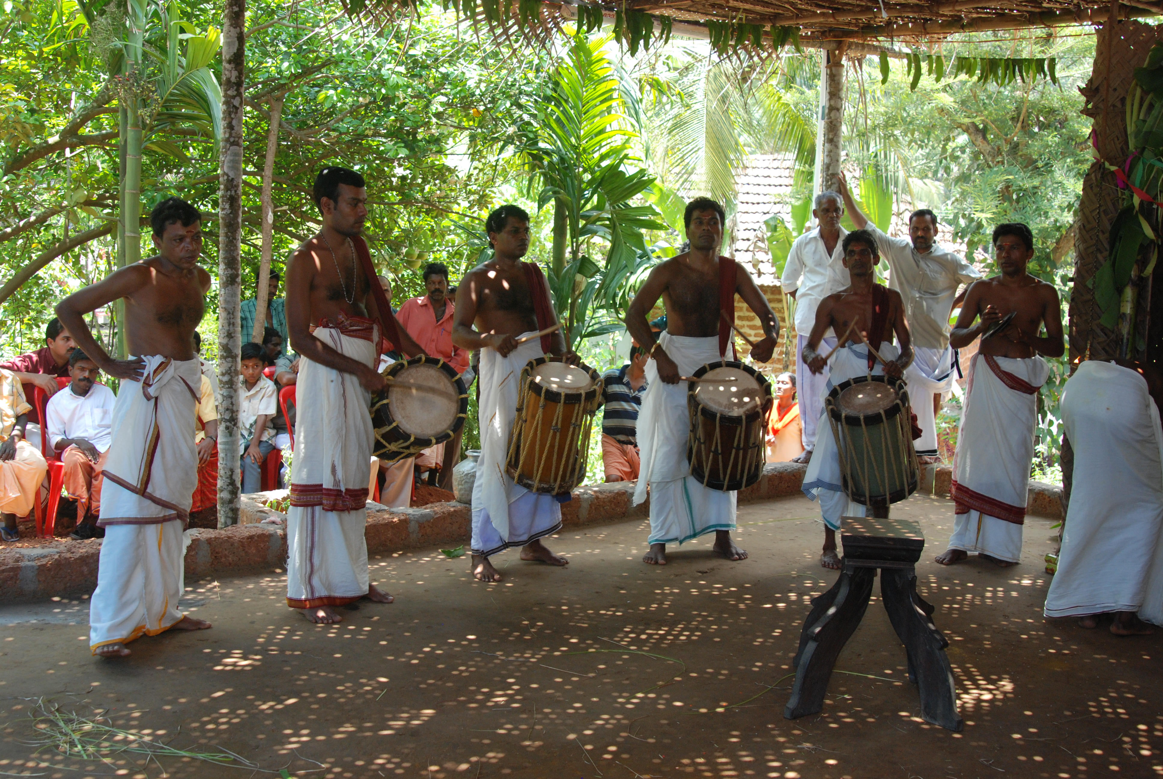 ചെണ്ടമേളക്കാര്‍ - തെയ്യത്തിന്റെ പുറപ്പാടിനു മുമ്പ്